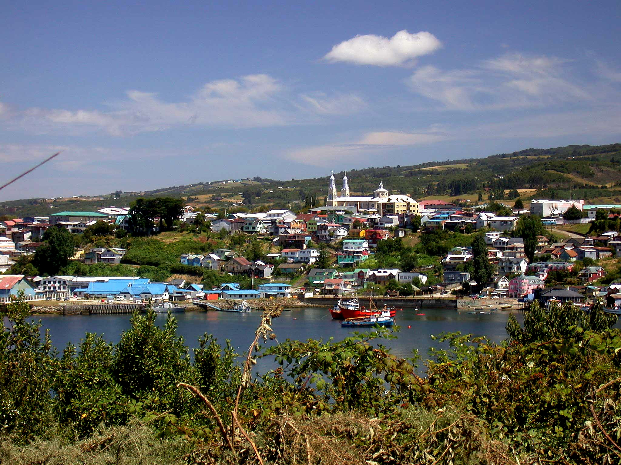 Vista parcial desde Tentén de la ciudad de Castro y de la iglesia San Francisco, una de las mas grandes iglesias construidas en madera nativa en Chile. This is a photo of a national monument in Chile: 165